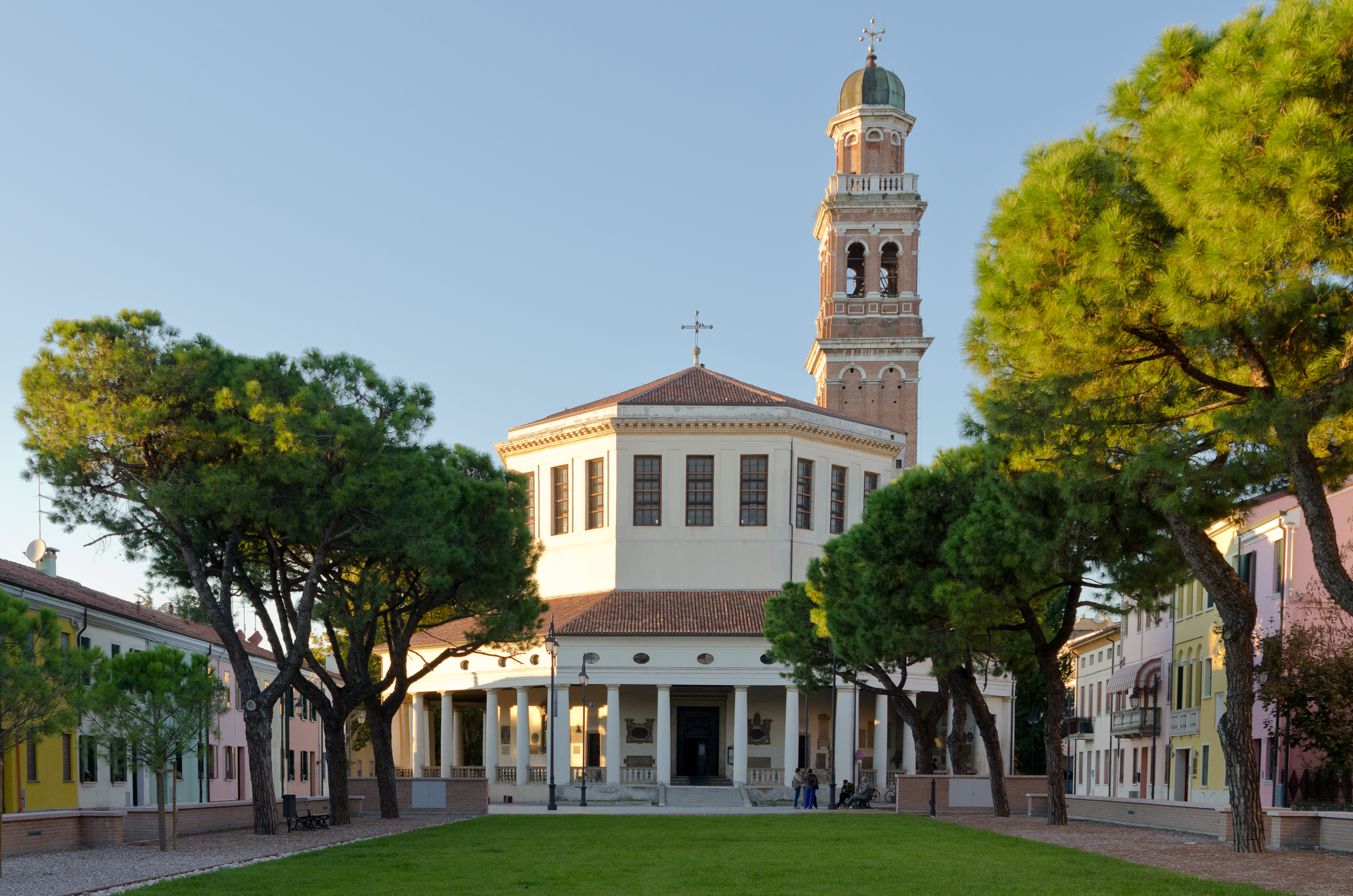 chiesa della beata vergine , Rovigo dopo il rifacimento della piazza foto by Mauro Cordioli